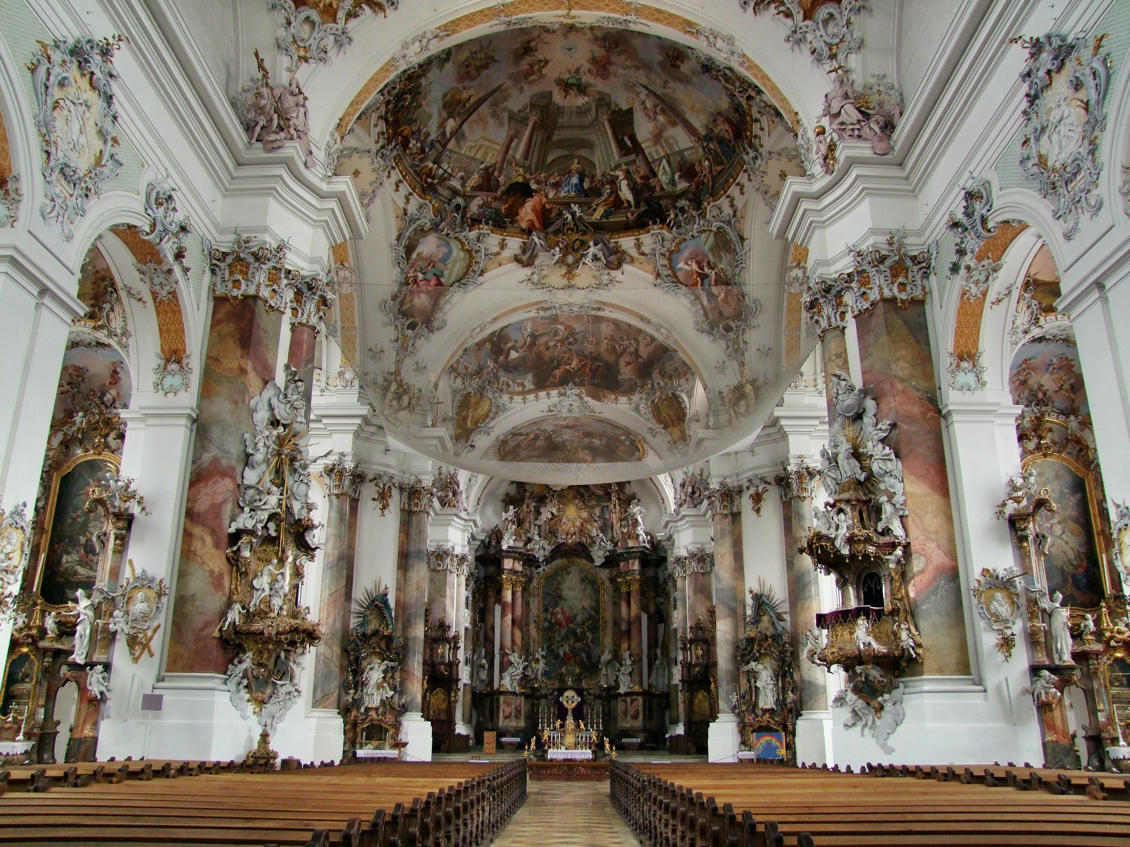 Blick in das Hauptschiff von der Eingangshalle aus mit Sicherungsnetz in der Vierung von der großen Restauration, Basilika Ottobeuren